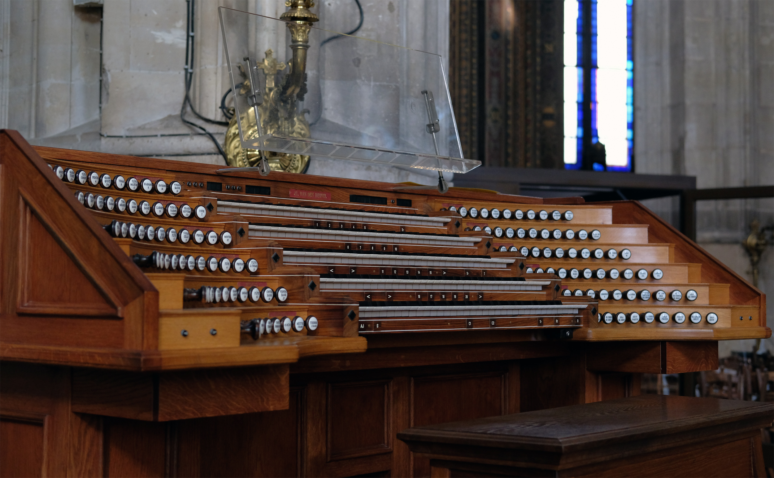 Église Saint-Eustache (pupitre mobile de l'orgue de tribune) - Paris Ier